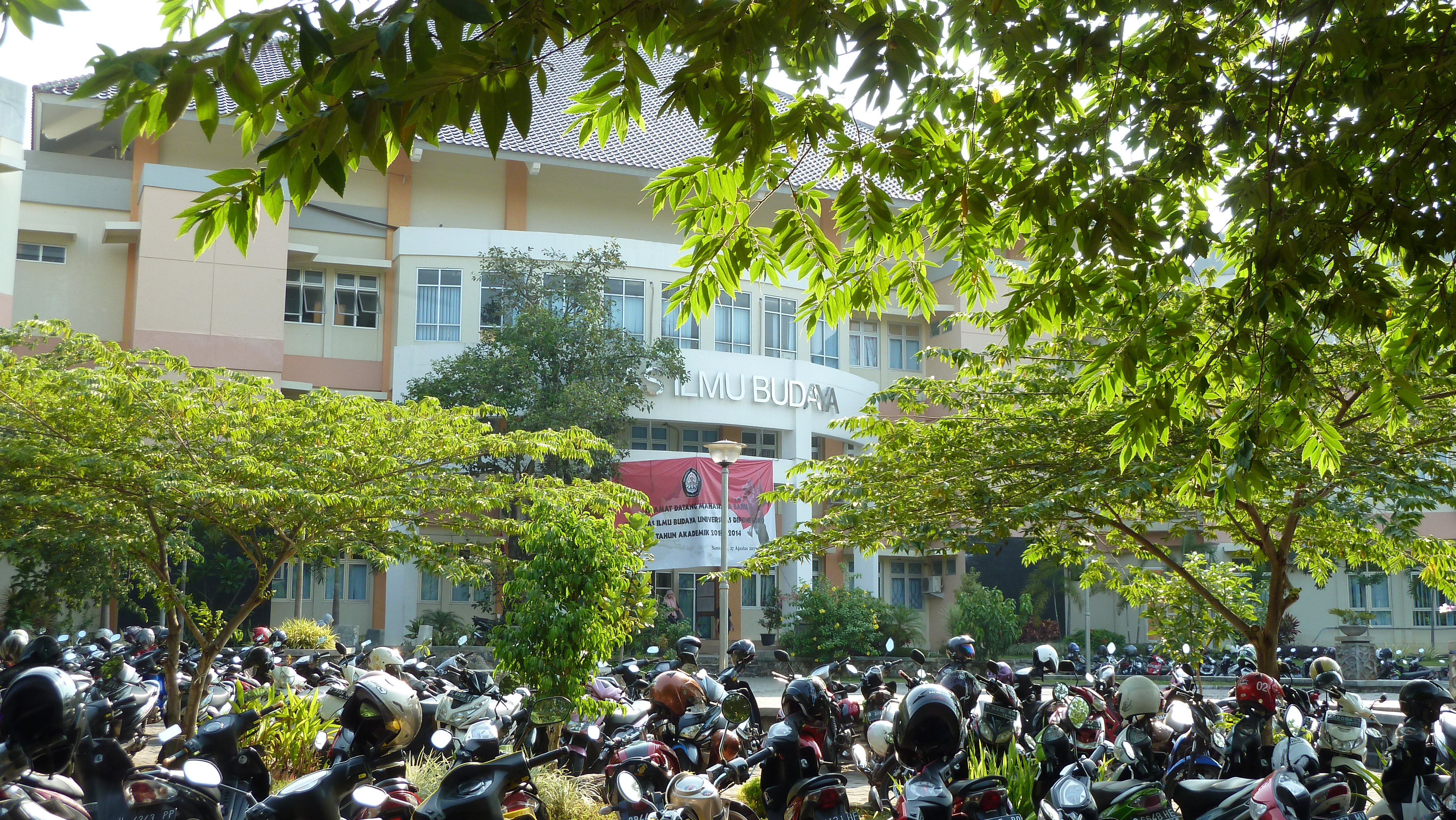 Halaman FIB UNDIP